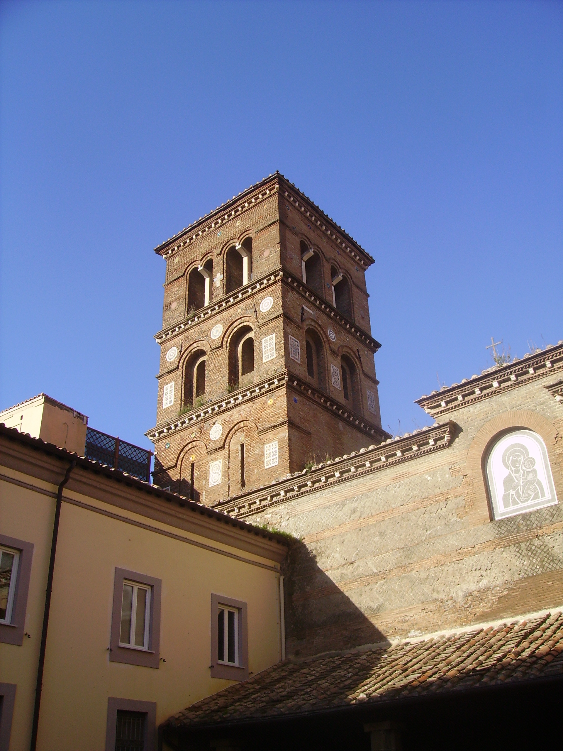 Il campanile della Rotonda ad Albano Laziale (RM)